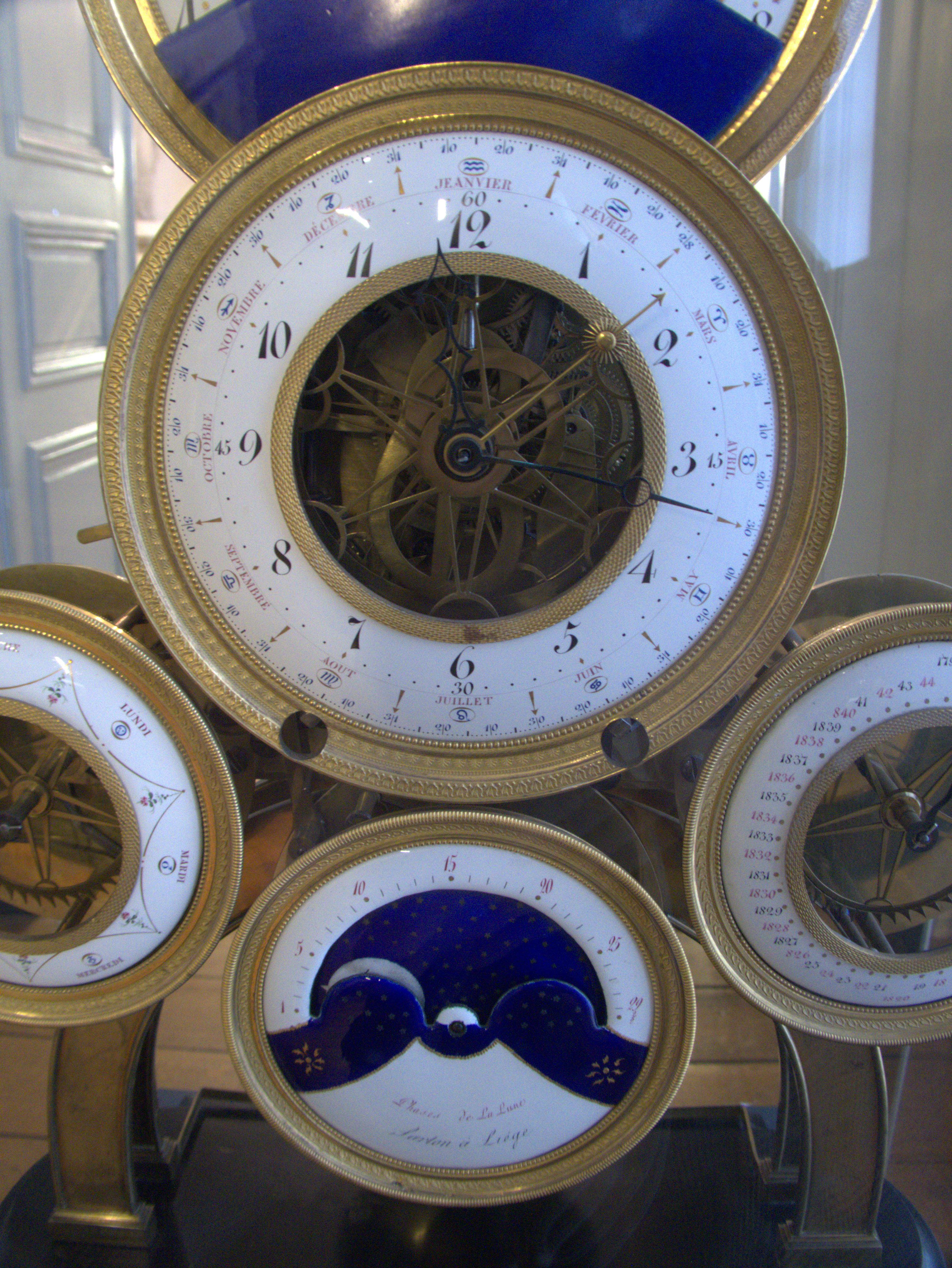 Pendule astronomique à 6 cadrans de Sarton réalisée en 1794 ou 1795 par Dieudonné Hubert Sarton. Œuvre exposée au Grand Curtius. Classé comme trésor de la Communauté Française le 2 Décembre 2013.